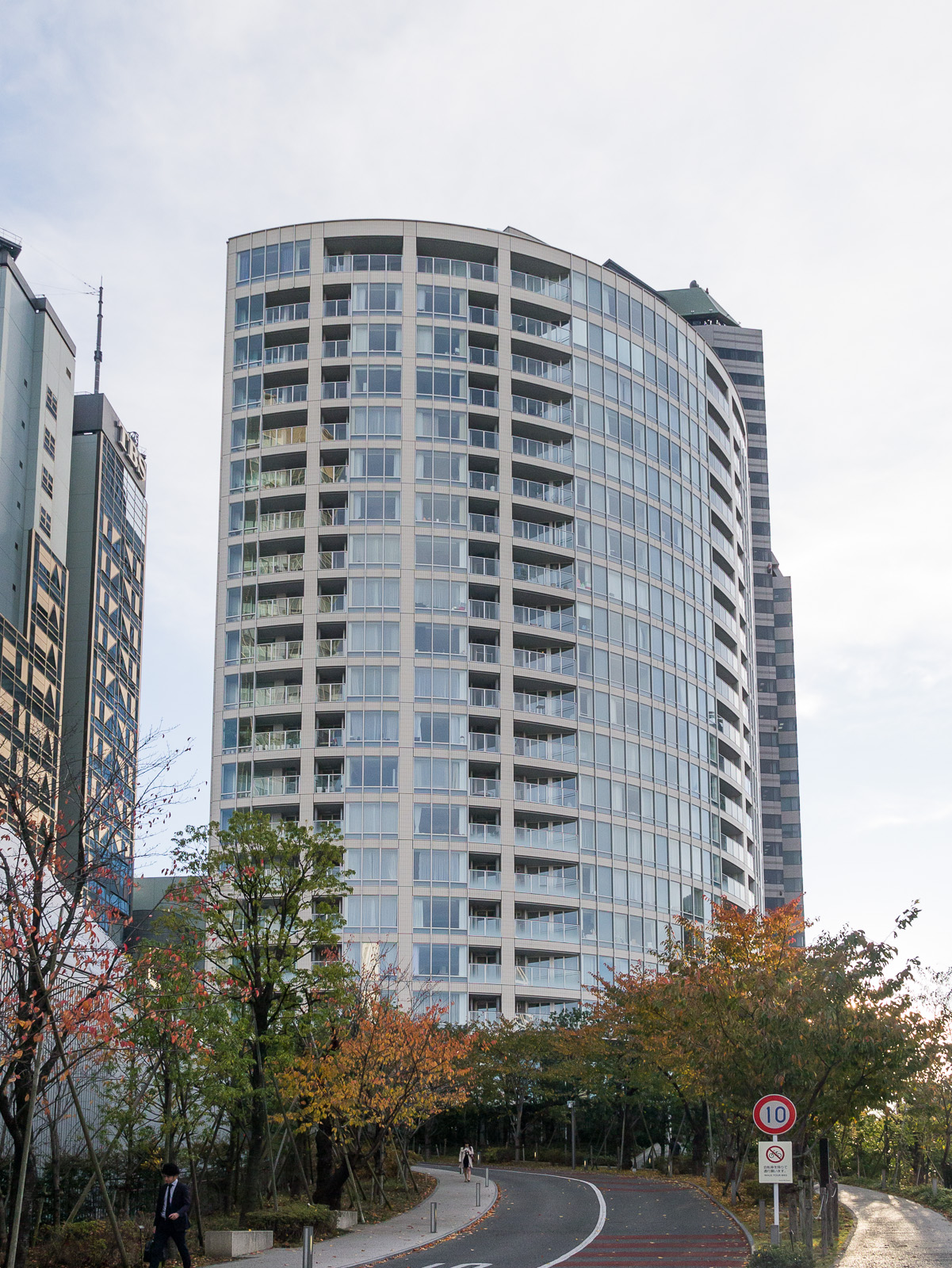 赤坂サカス、ザ・レジデンス。東京都港区赤坂5丁目。